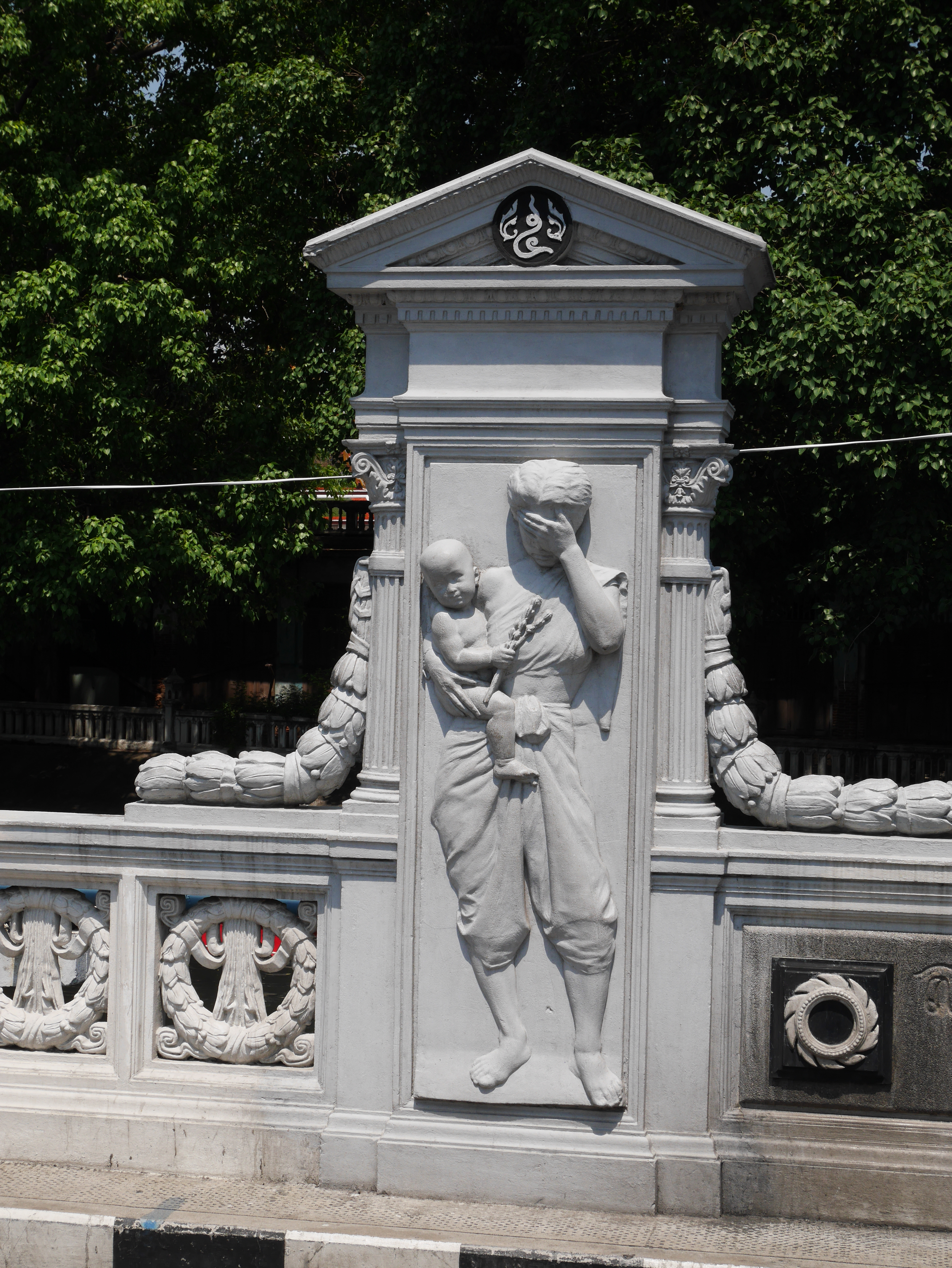 สะพานมหาดไทยอุทิศ